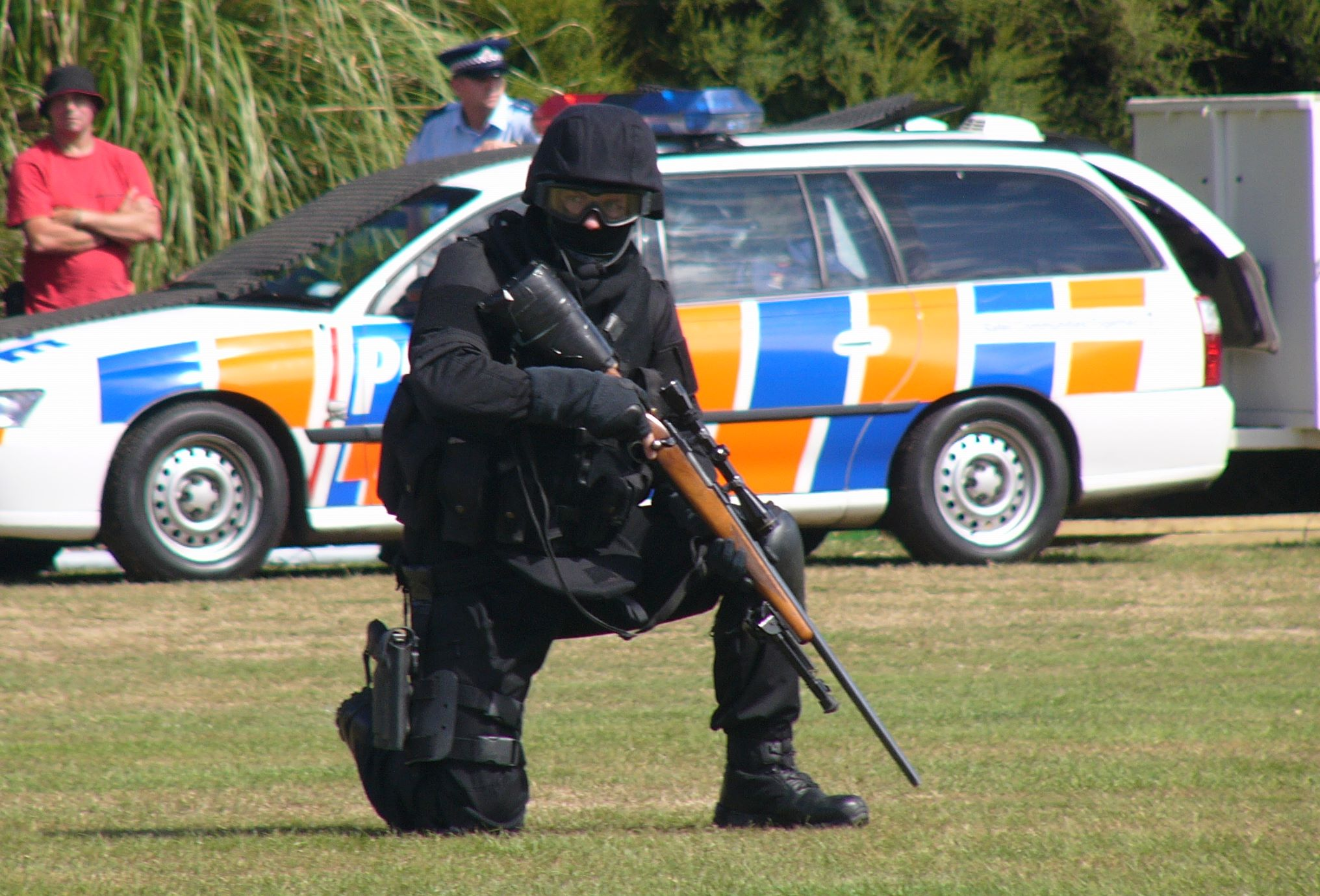 More Photos available at